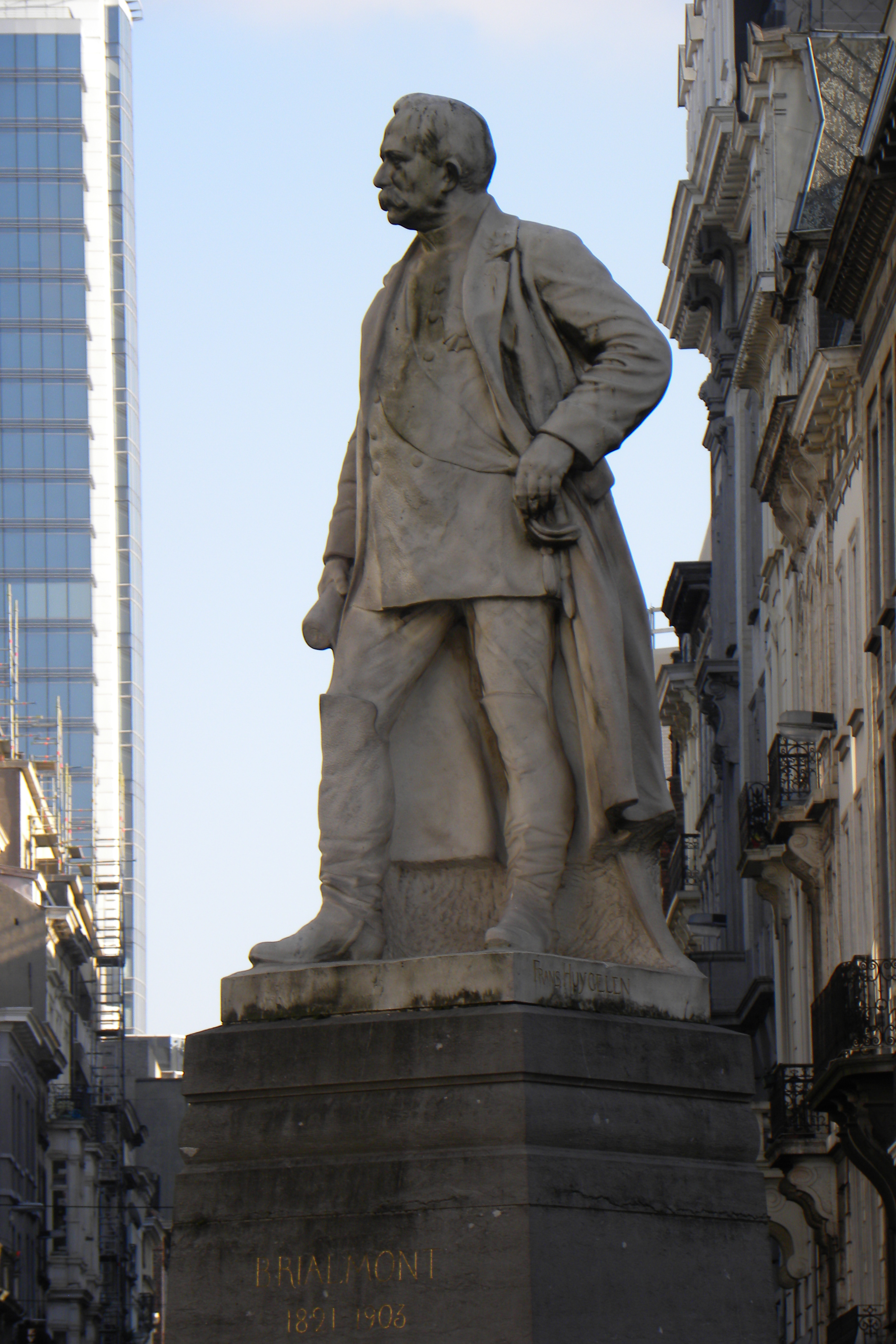 Henri Alexis Brialmont 1821-1903. Monument au carrefour de la rue de Louvain et de la rue Royale à Bruxelles. Oeuvre de Franz Huygelen.